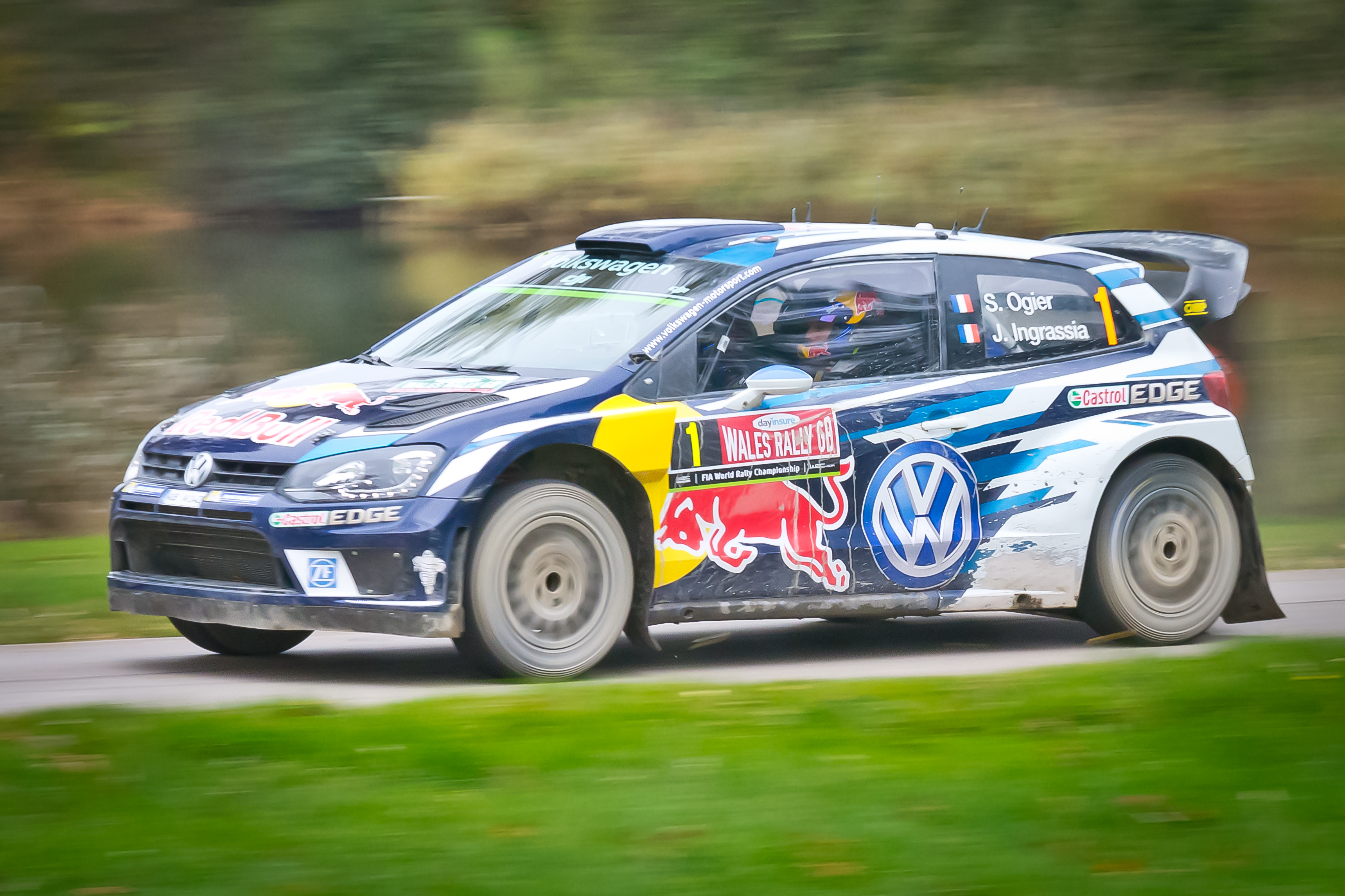 Sébastien Ogier podczas Rajdu Wielkiej Brytanii 2016